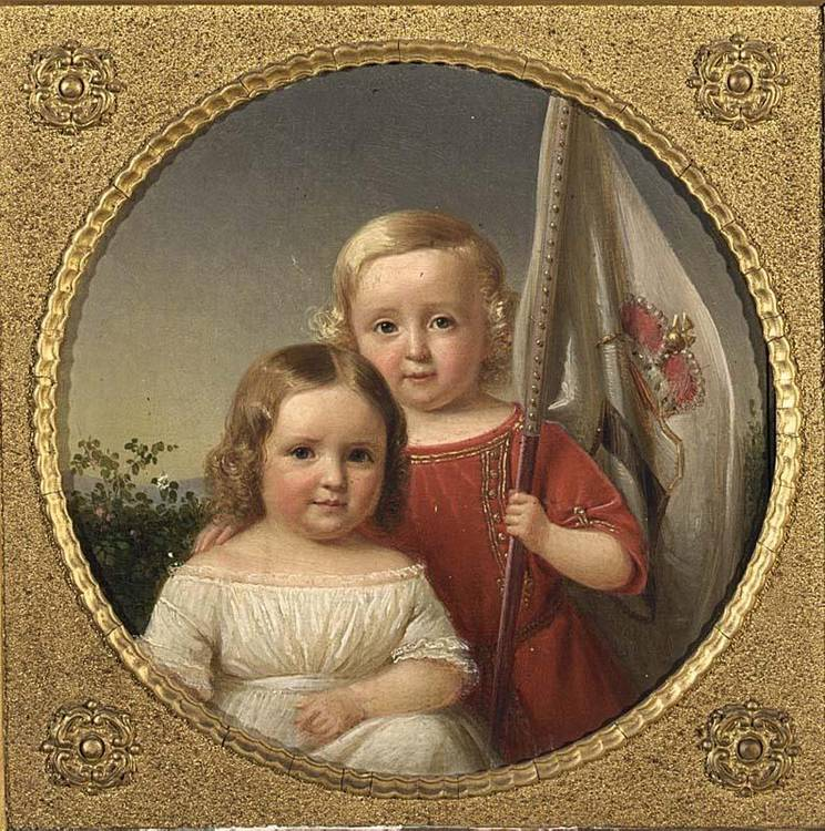 Gustav zu Ysenburg-Budingen, geboren zu Budingen. den 31 Dec. 1841. / Thecla ( Ferdinade Henriette Mathilde Prinzessin zu Ysenburg, geboren zu Büdingen den 19 Nov. 1842.